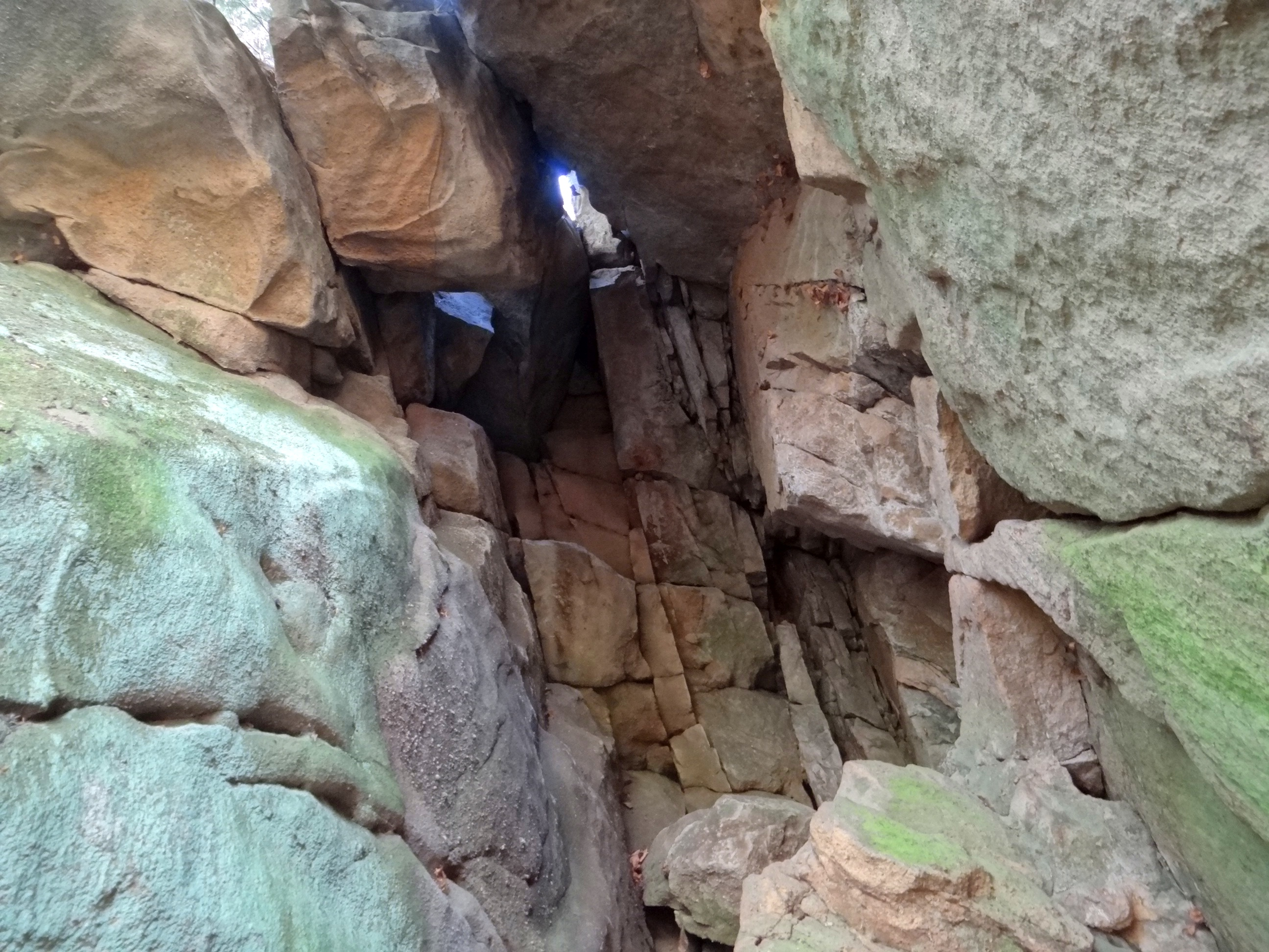 Schronisko Diabli Most w rezerwacie przyrody Diable Skały